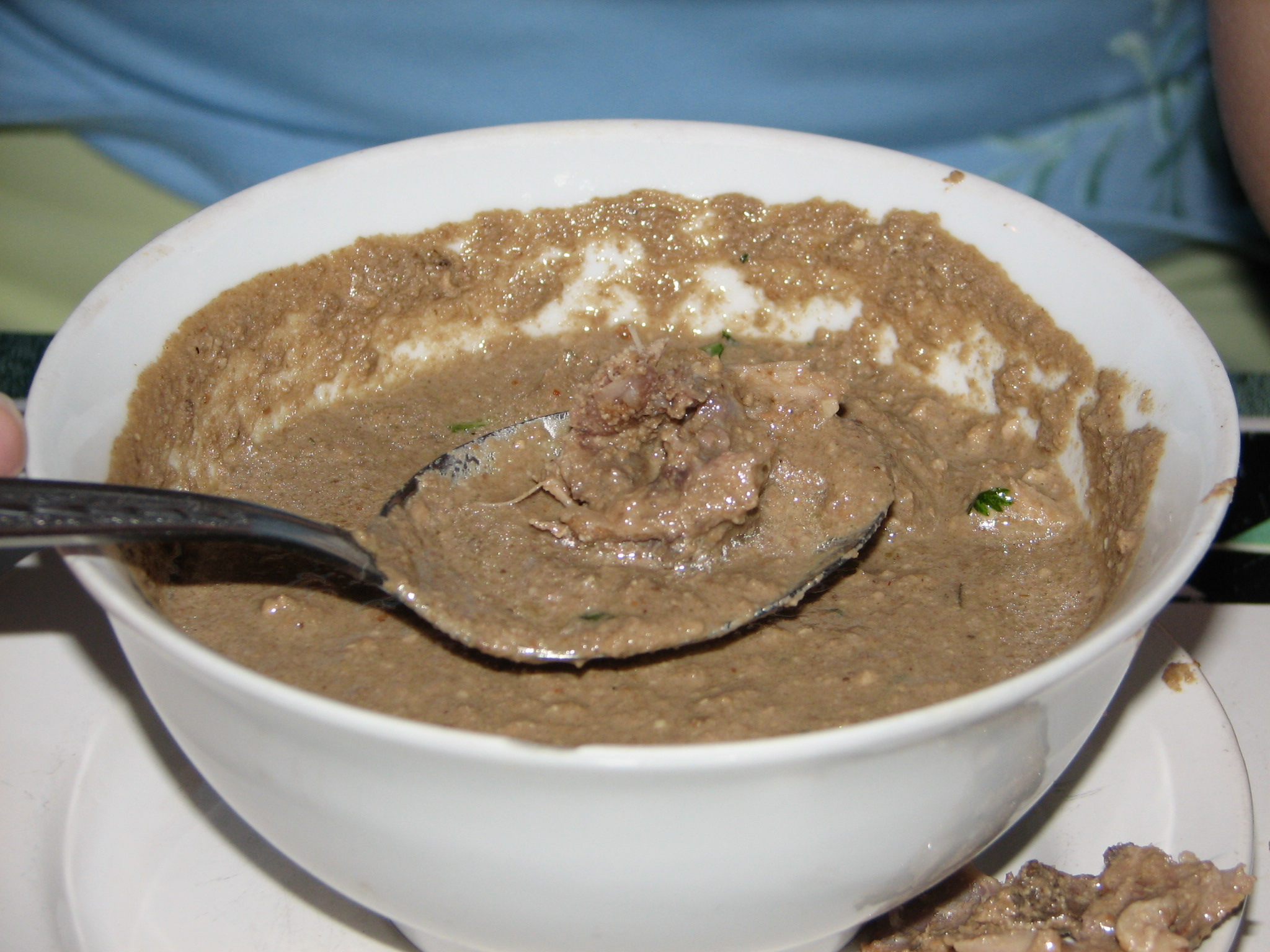 Сациви